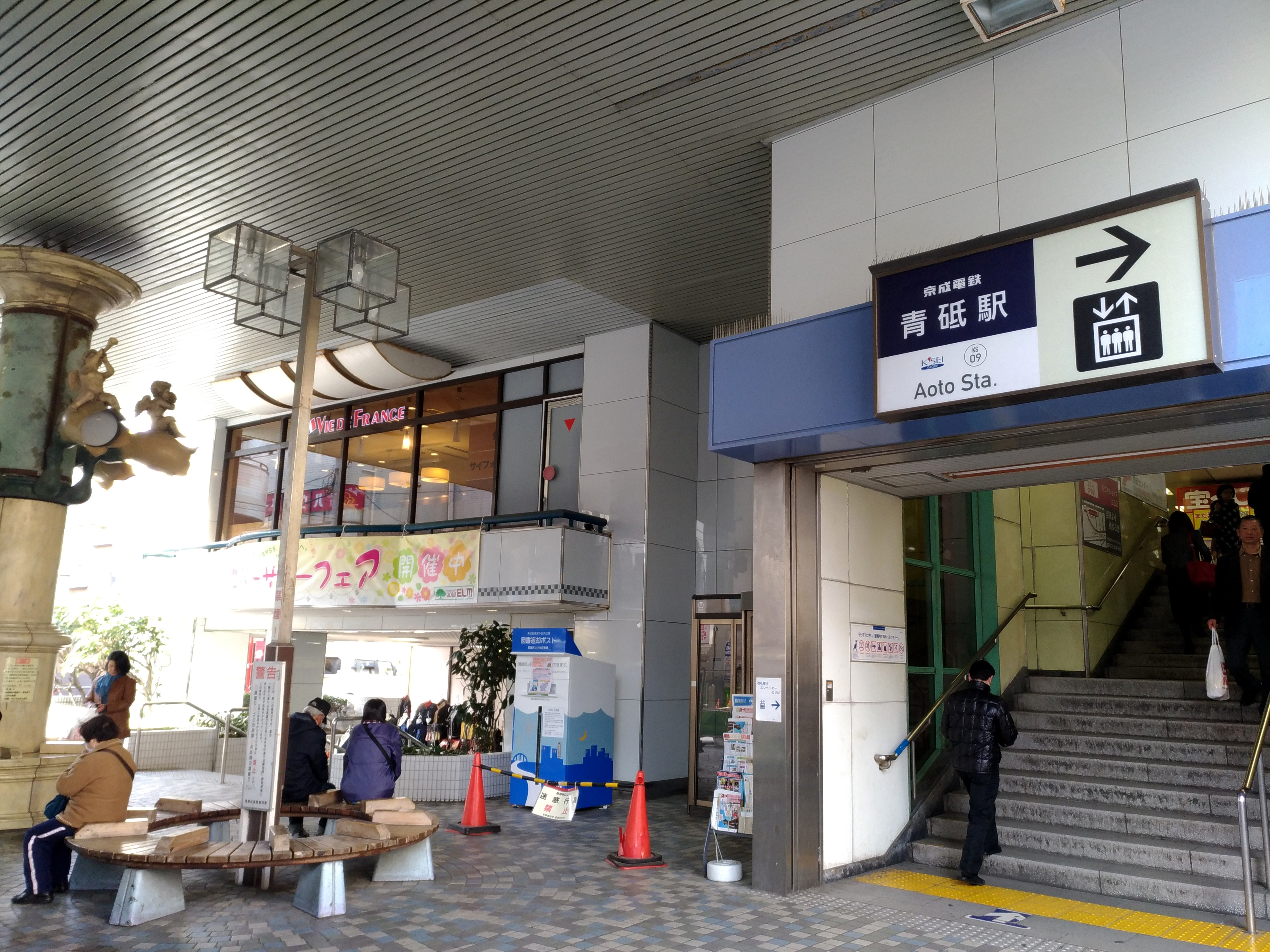 青砥駅出入口1